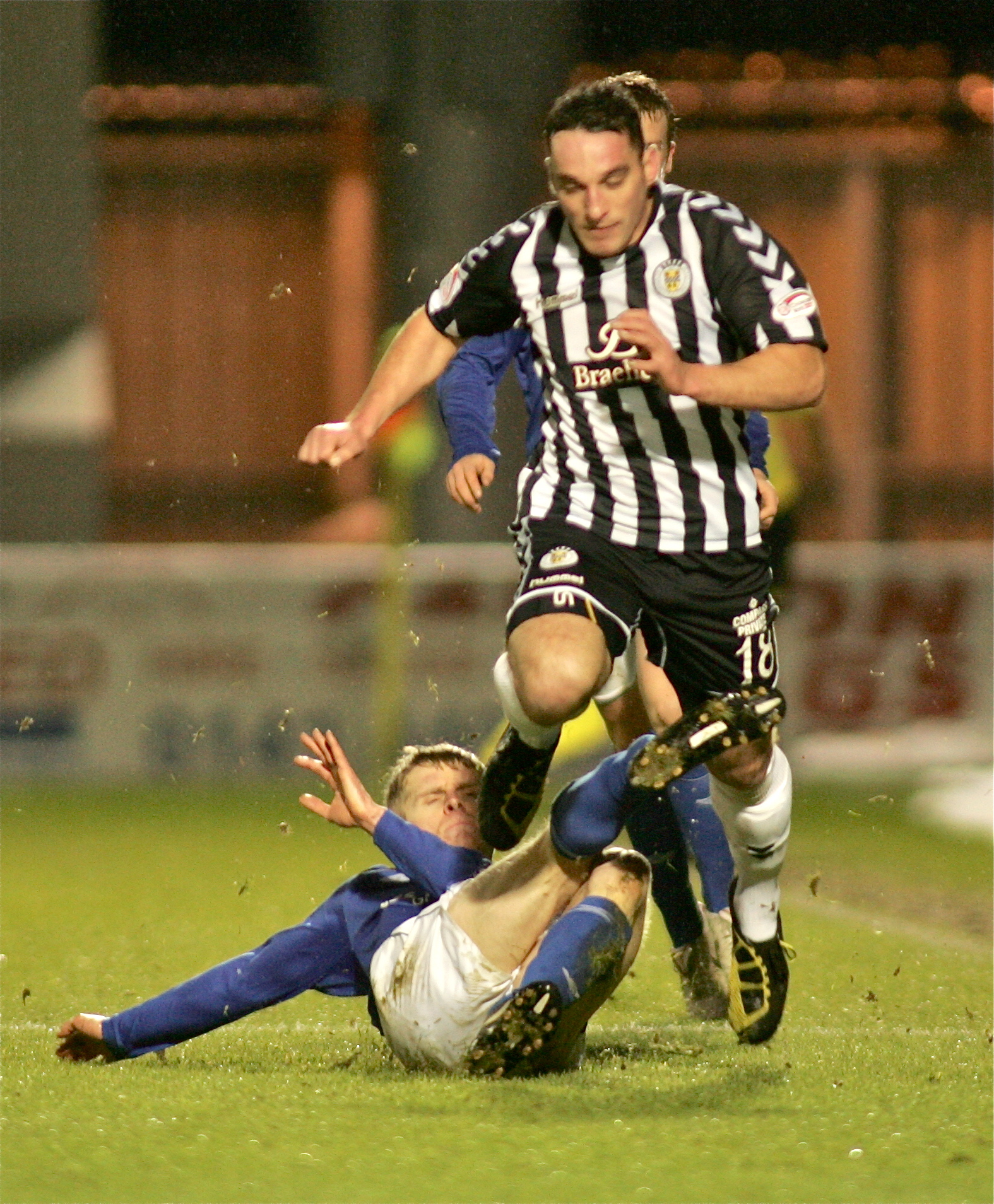 St Mirren vs Peterhead